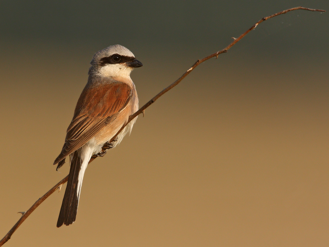 männlicher Neuntöter (Lanius collurio)